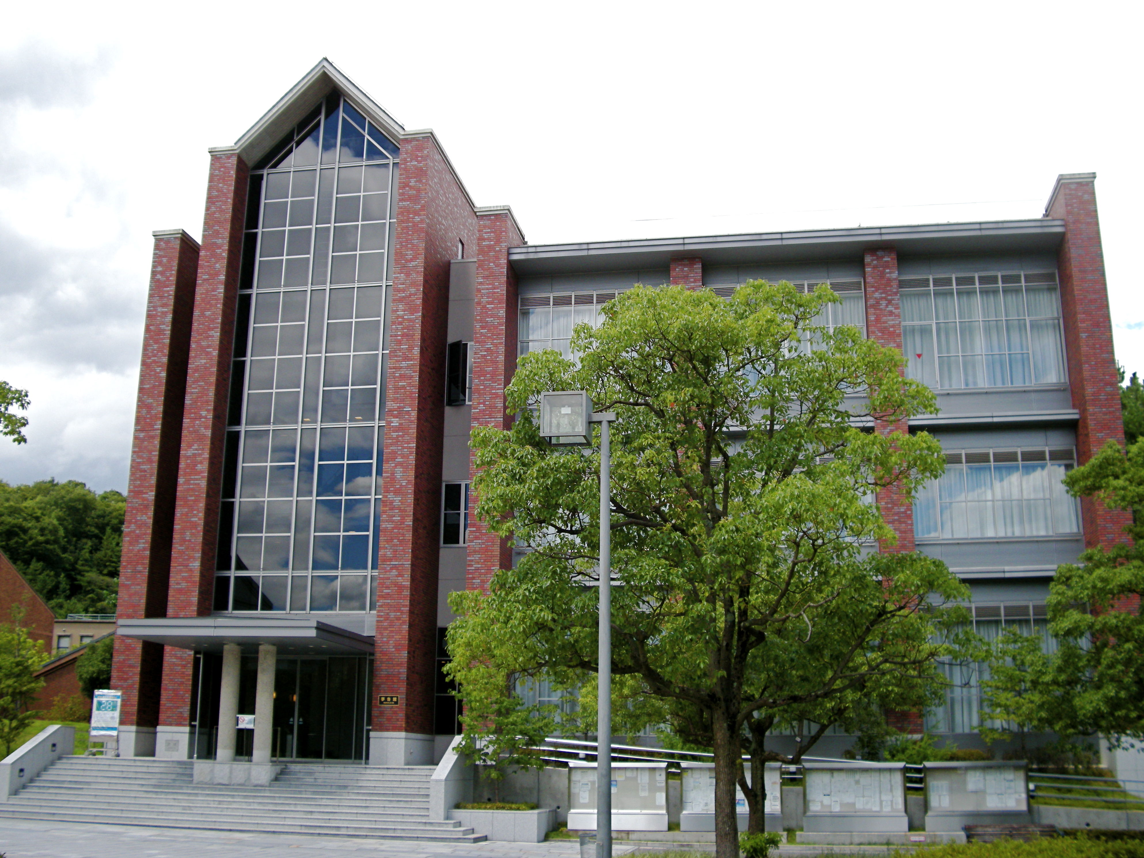 Mukoku-kan (Doshisha University)